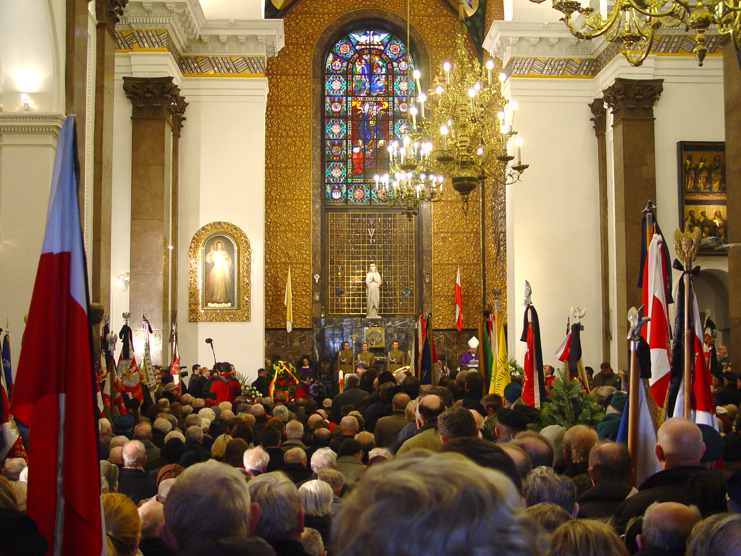 Msza żałobna gen. Antoniego Hedy "Szarego", Katedra Polowa Wojska Polskiego przy ul. Długiej w Warszawie, 21 luty 2008r.(lokalizacja w WikiMapia